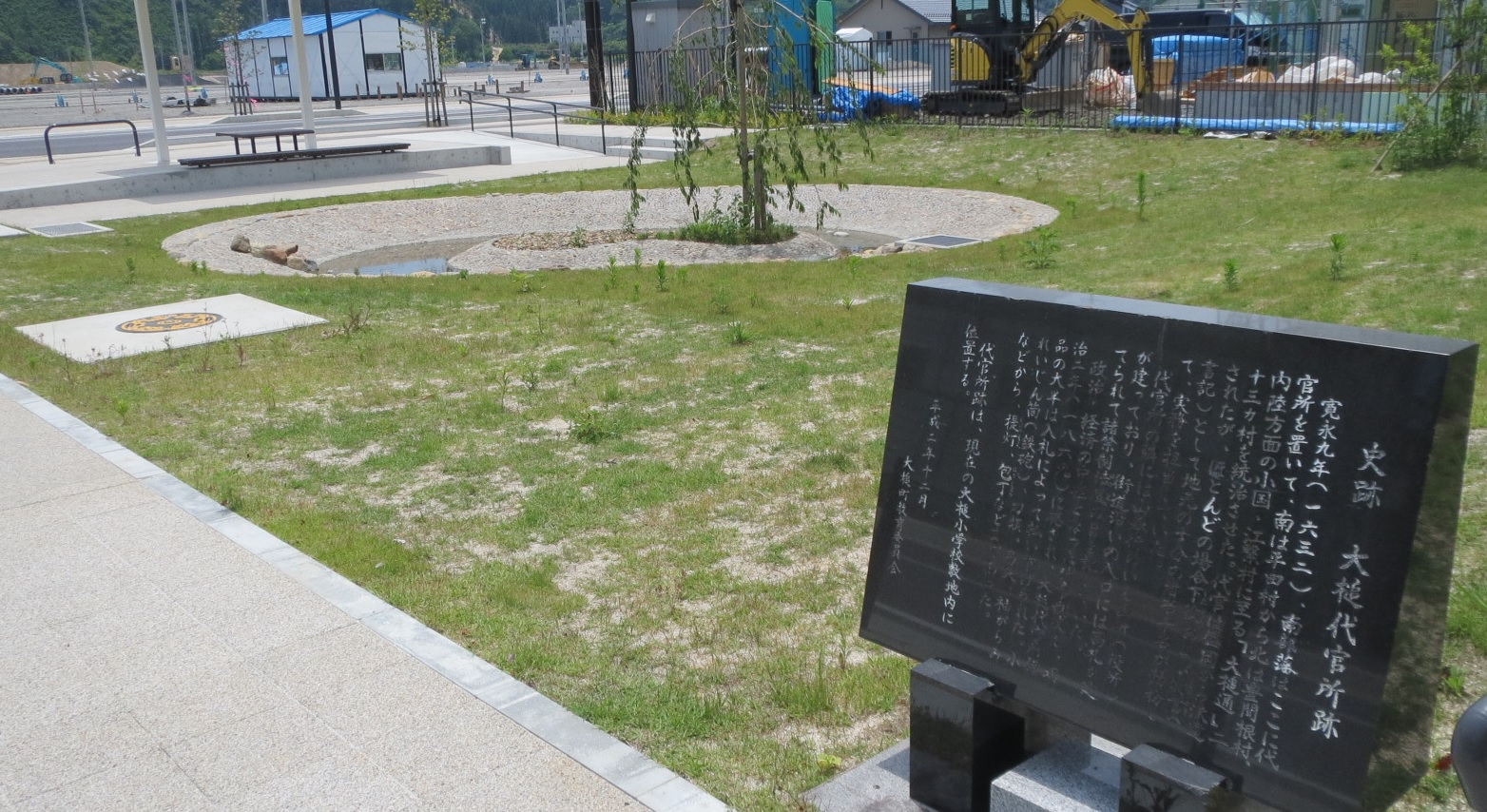 大槌小槌線沿いにある大槌代官所跡公園。もはや遺跡はなく、碑文で説明されるのみである。